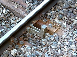 Permanentní magnet signalizace omezení rychlosti u pracovního místa pro švýcarský zabezpečovač Signum